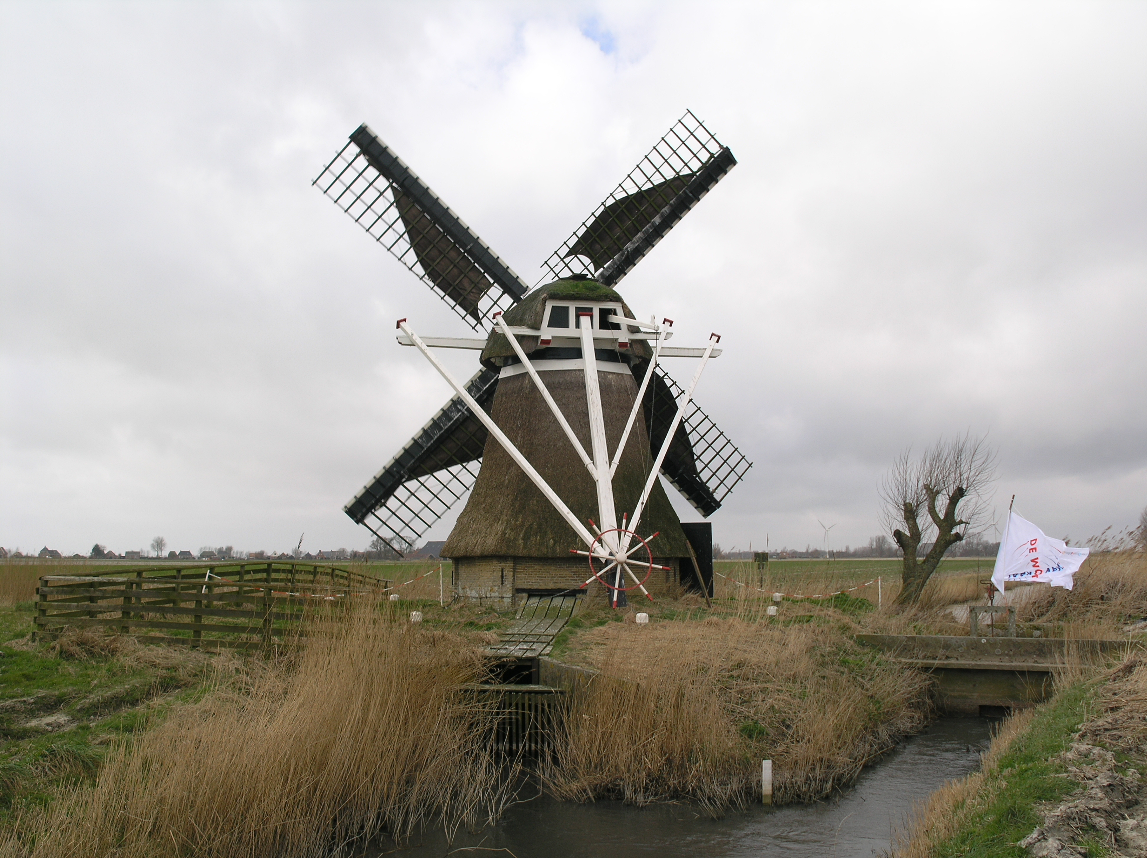 Oude Leije Balkendster poldermolen